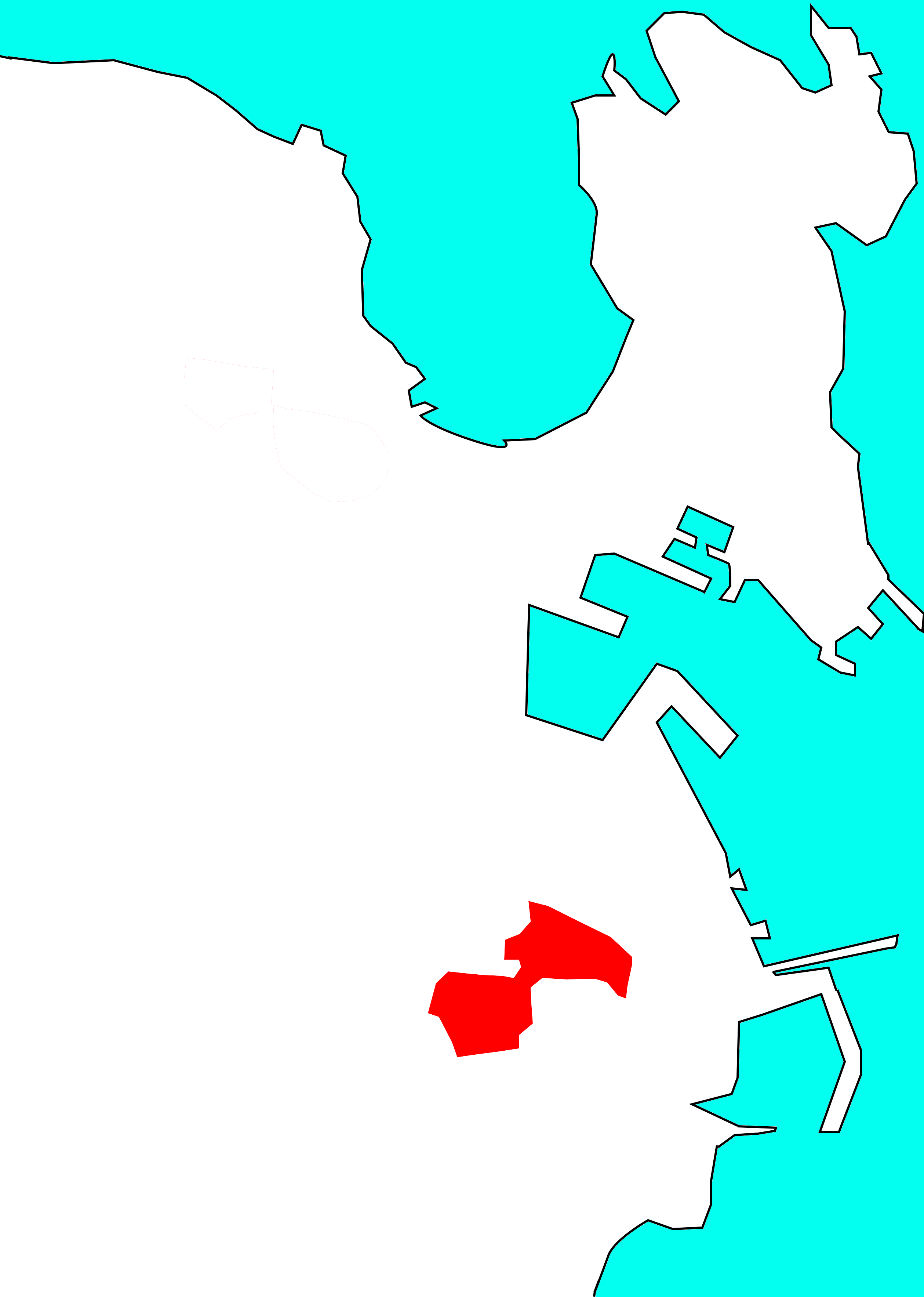 Situación do Castrillón no concello da Coruña, segundo